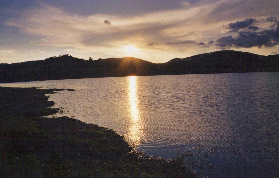 Laguna tejeria de Chilacachaoa Gro.